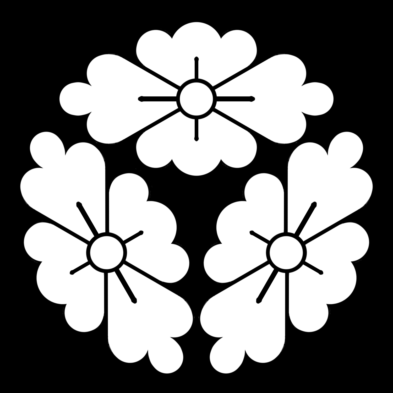 「三つ花菱」紋（染抜）